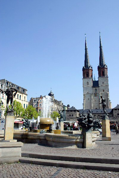 Halle (Saale), Hallmarkt